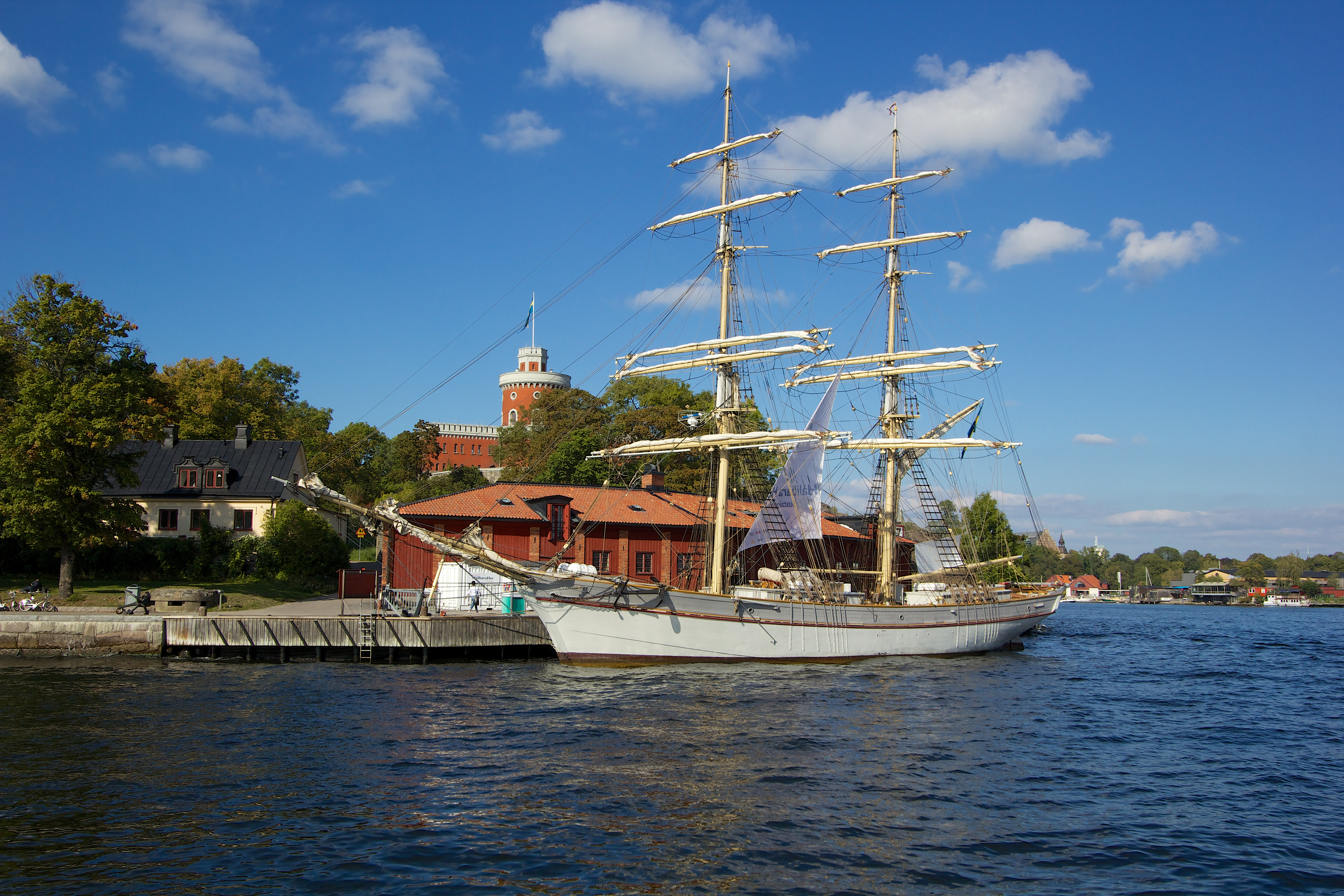 Briggen Tre Kronor. Stockholm, Stockholm